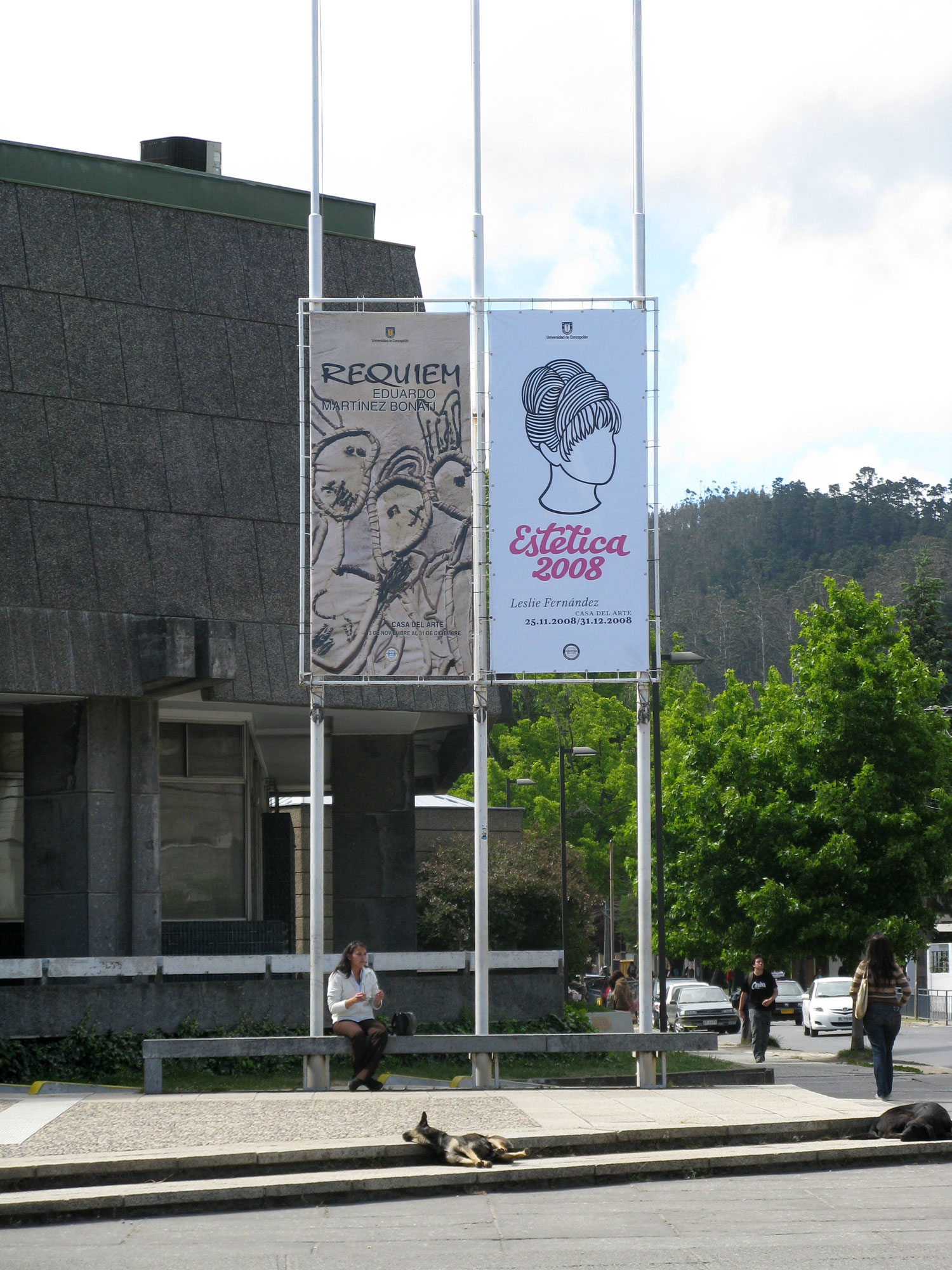 Fotografía del frontis de la "Casa del Arte" (Pinacoteca) de la Universidad de Concepción, museo de la ciudad de Concepción, Chile. Donde se sustenta la Pinacoteca que posee, junto con el Museo Nacional de Bellas Artes de Santiago, la colección de pinturas chilenas más grande del país.